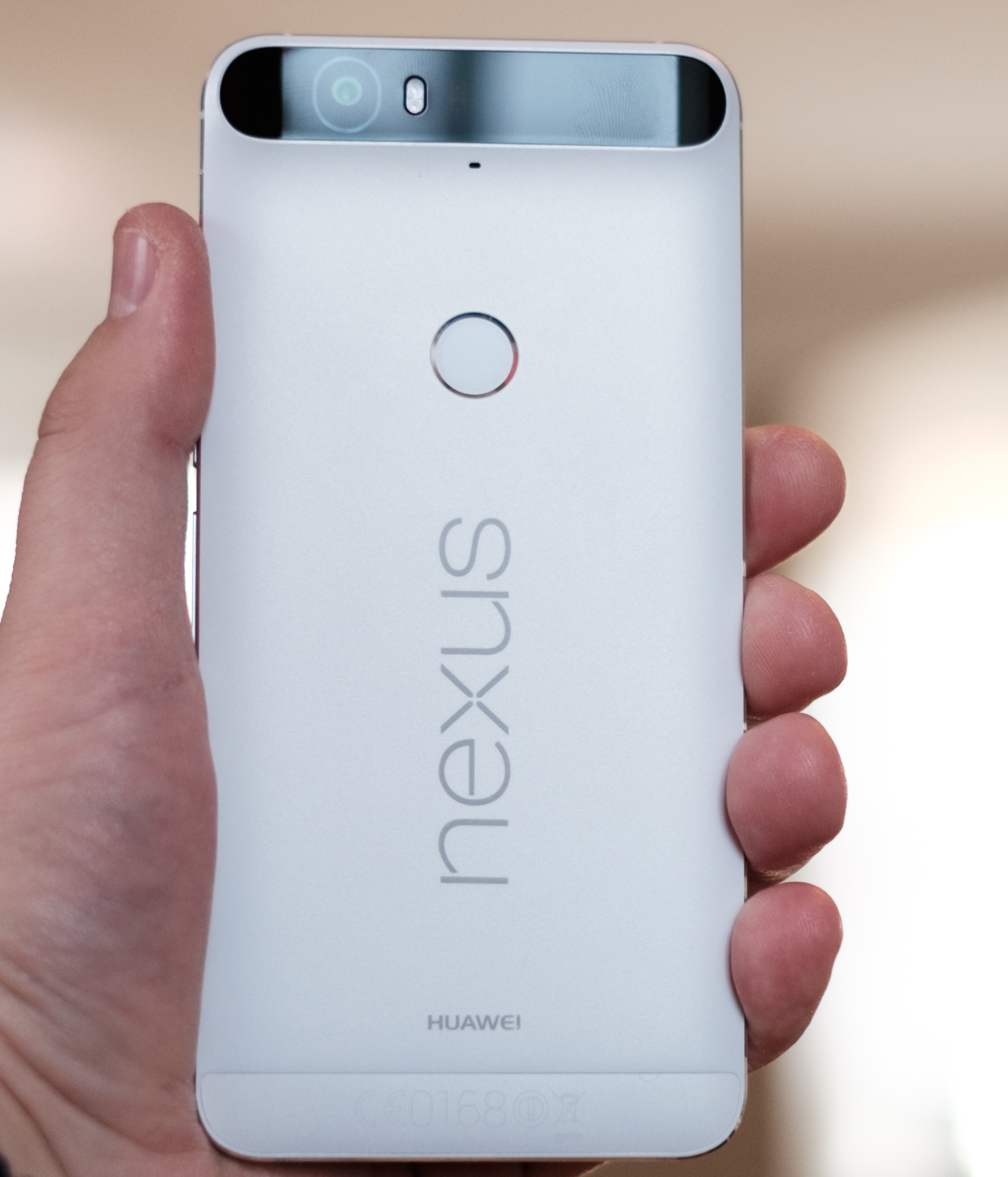 Huawei Nexus 6P